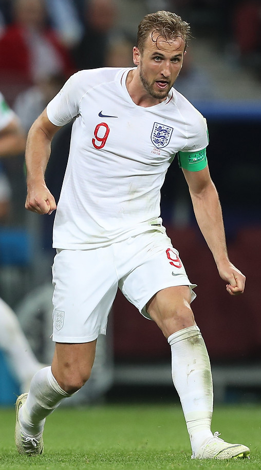 Сборная Хорватии оставила за бортом финала ЧМ-2018 команду Англии